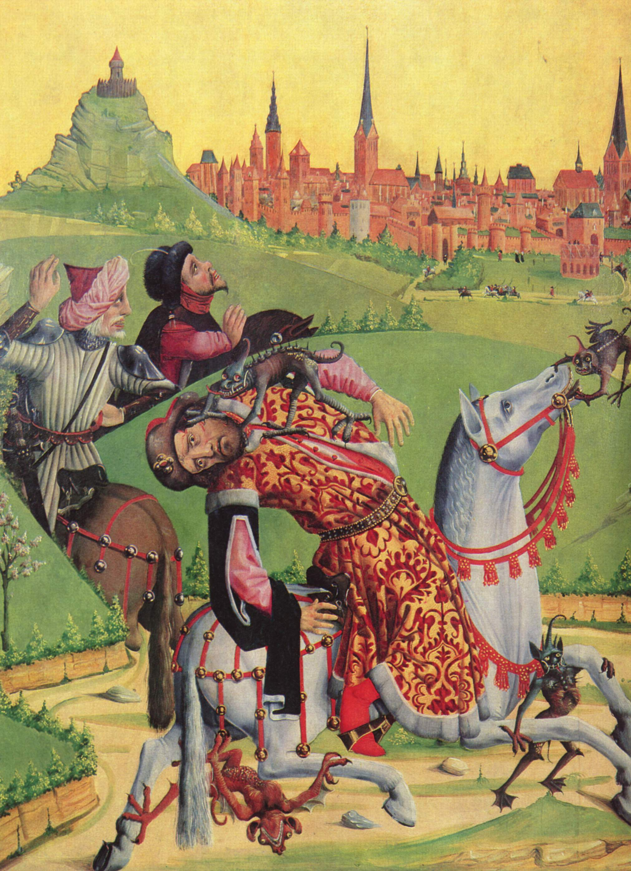 Heiligentaler Altar Detail: Tafel: Aegeas verfällt dem Wahnsinn und stirbt - im Hintergrund: älteste Darstellung Lüneburgs mit Kalkberg und Altstadt von Süden. Zu erkennen sind der zur Saline gehörige Weiße Turm, links im Verlauf der Stadtmauer mit dunklem Dach und ohne Turm das Kirchenschiff von St. Cyriakus. Hoch aufragend und dunkel gedeckt der runde Springintgut-Turm, rechts daneben die Michaeliskirche und daneben wiederum die ehmalige Lambertikirche.